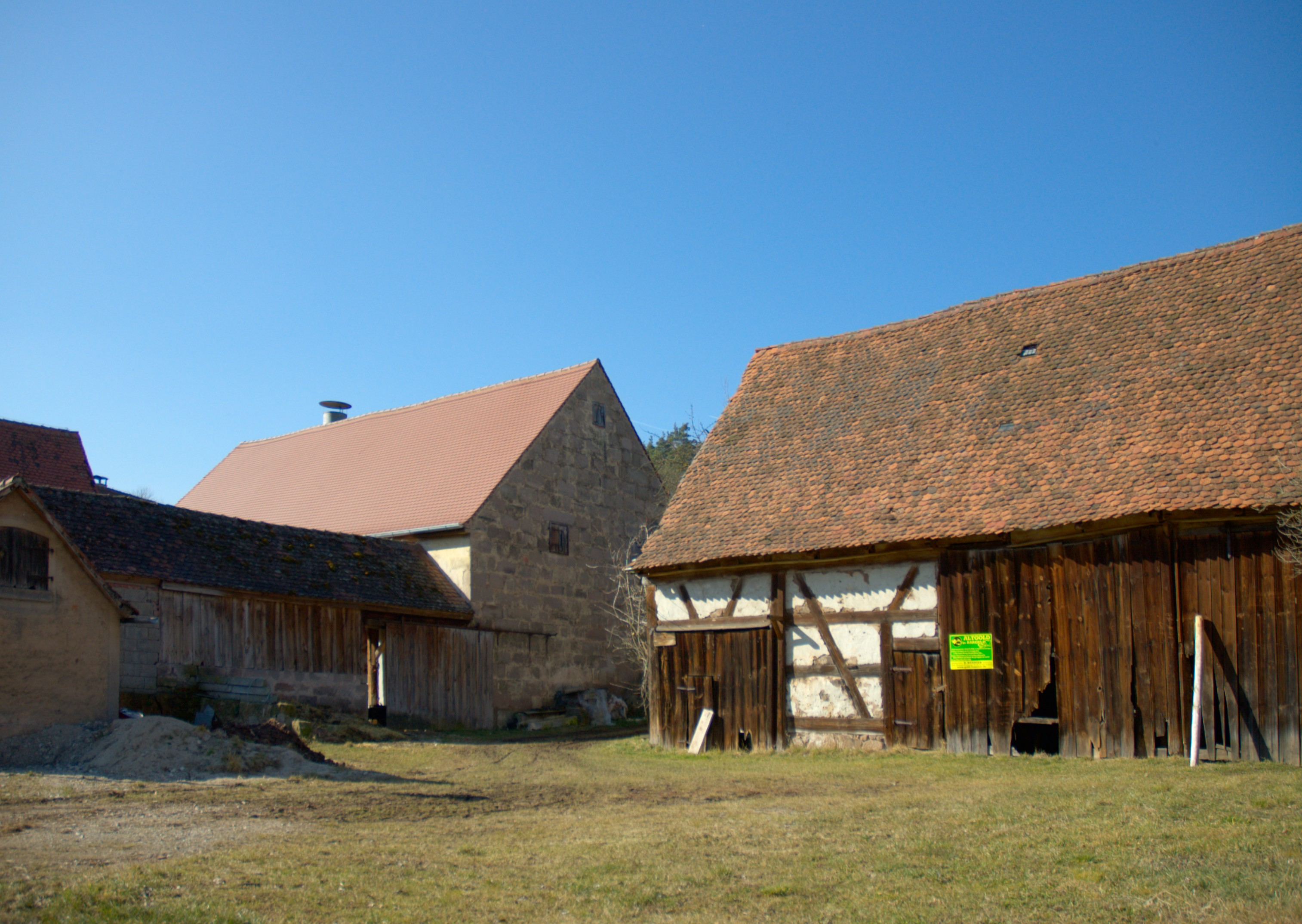 Hörleinsdorf